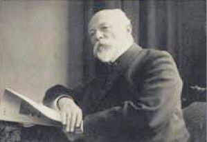 Karl Pabst (1835–1910), Bürgermeister der Stadt Weimar / maire de la ville de Weimar